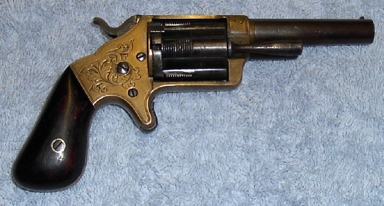 Brooklyn Firearms Slocum Manufactured from 1863 to 1864 Système particulier de chargement des revolvers jm sorriaux photo personnelle libre de droit